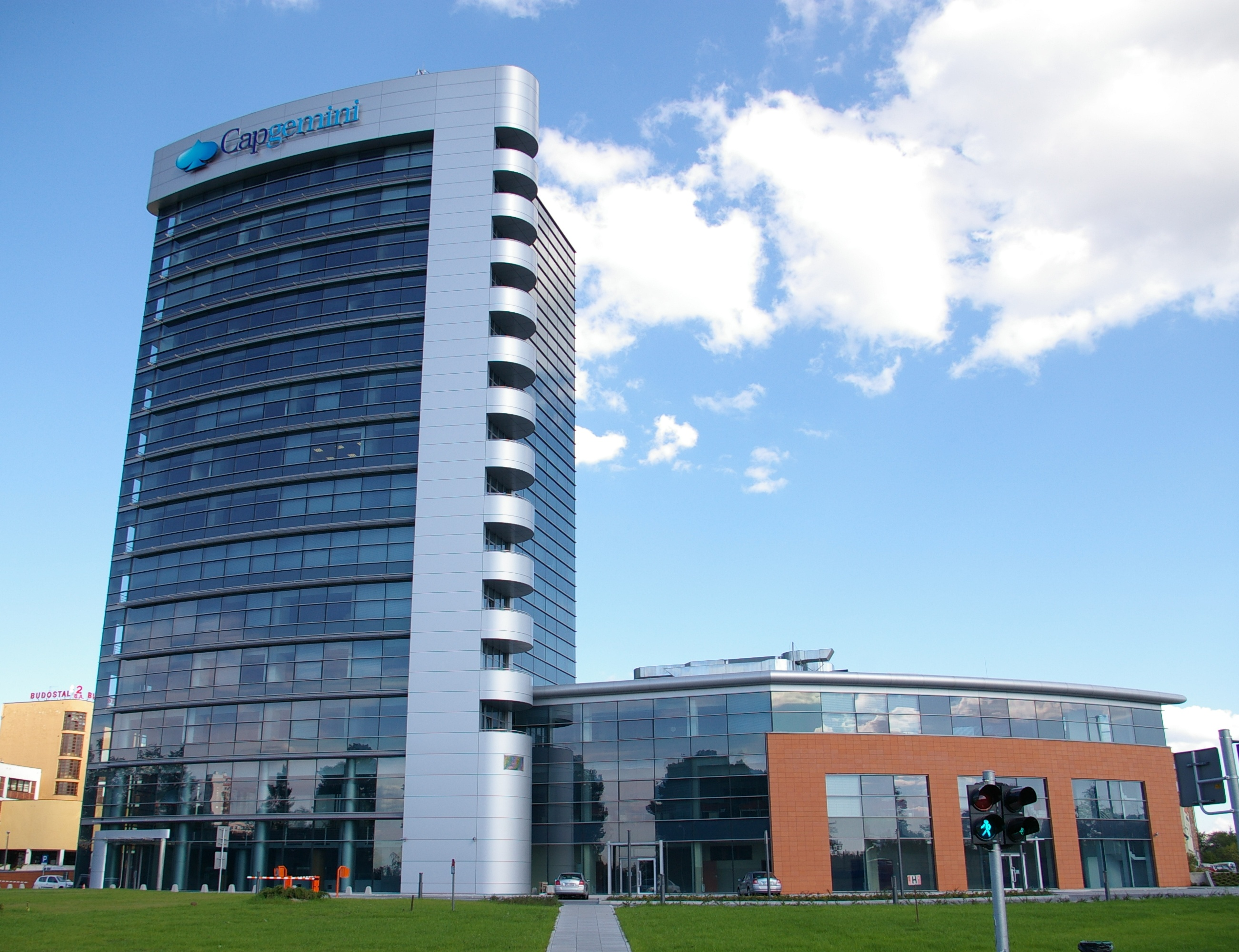 Wieżowiec Rondo Business Park w Krakowie